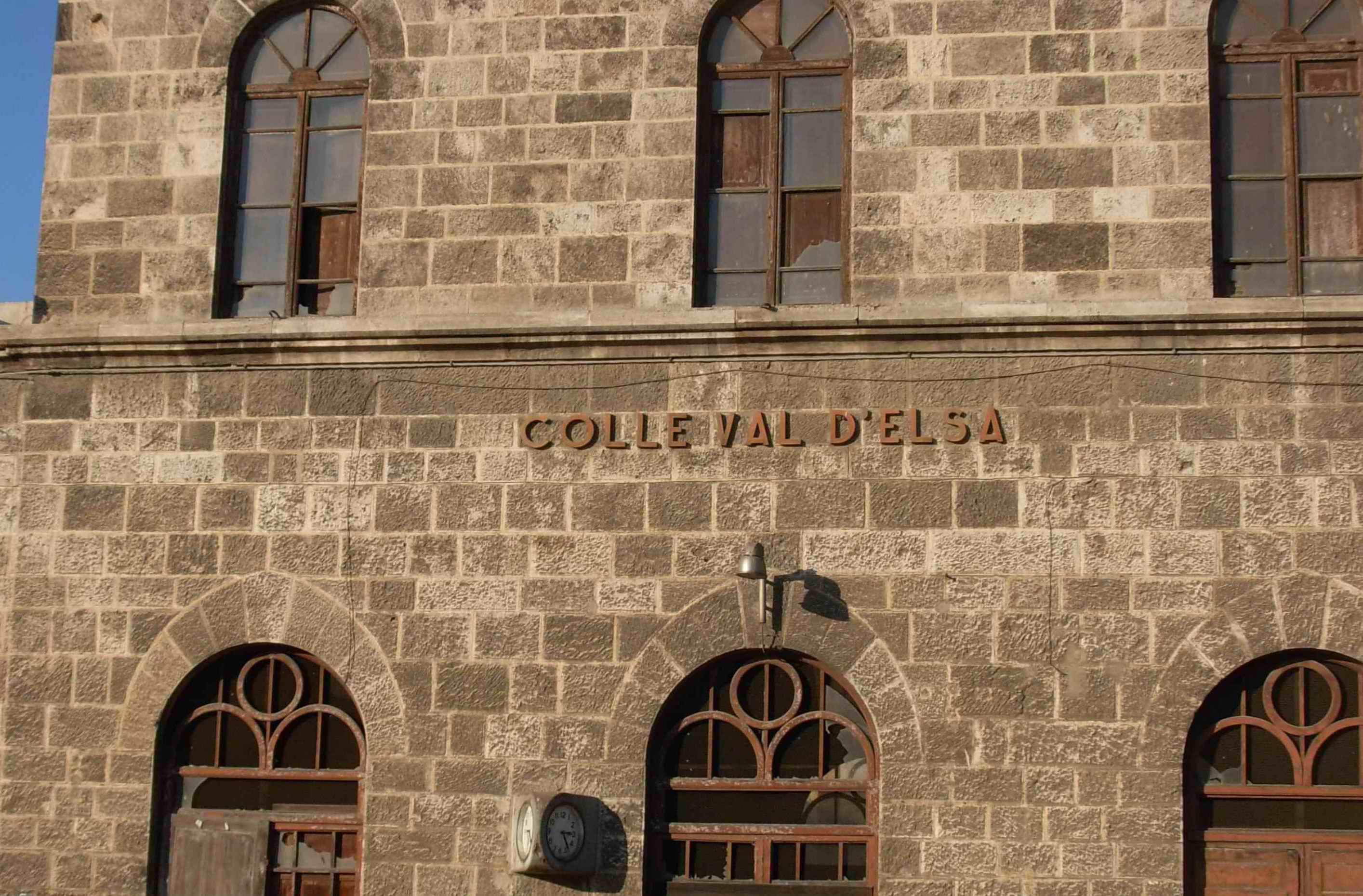 Colle di Val d'Elsa (Italia): La Stazione, particolare